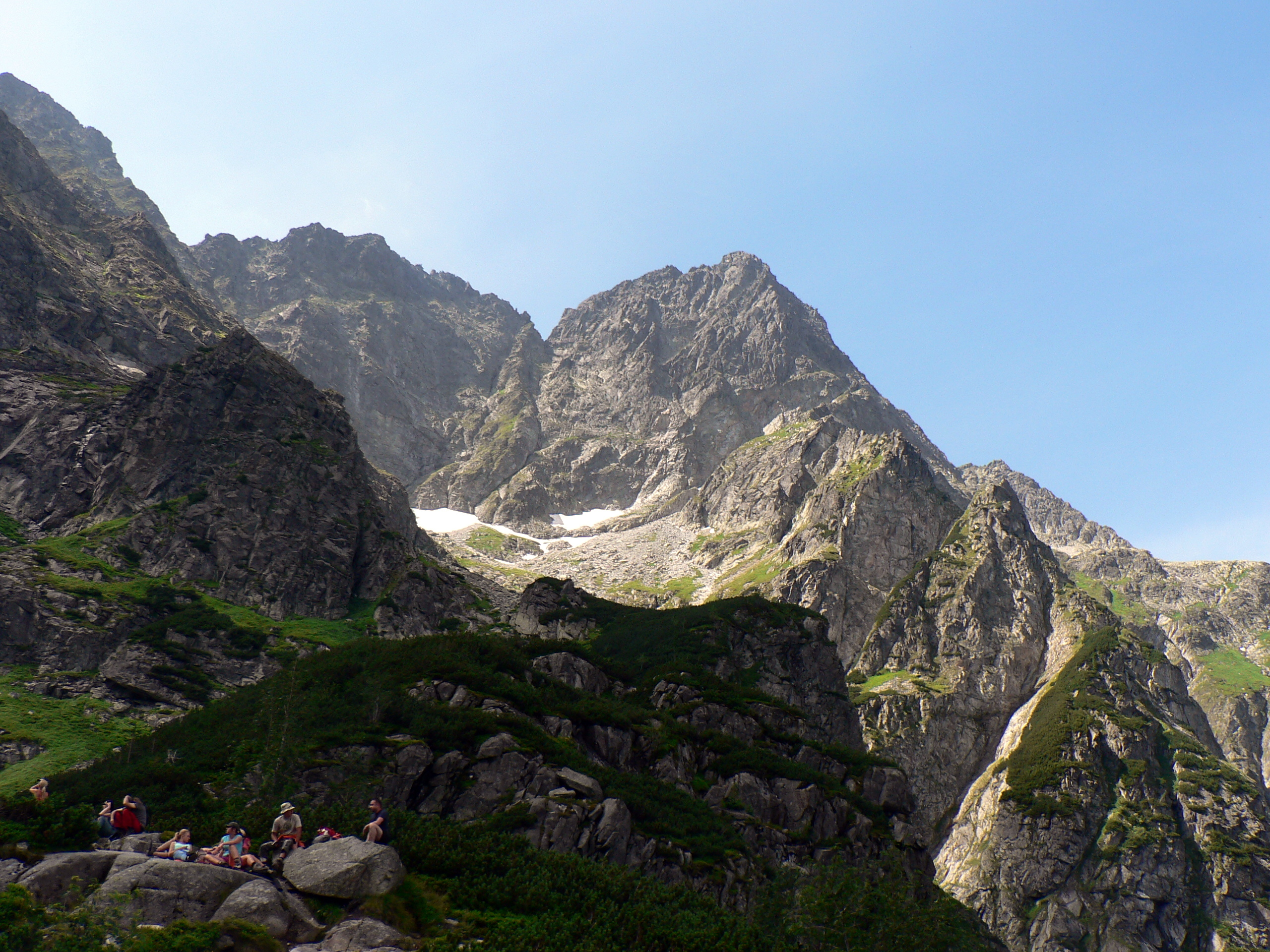 Mięguszowiecki Szczyt Wielki znad Czarnego Stawu pod Rysami